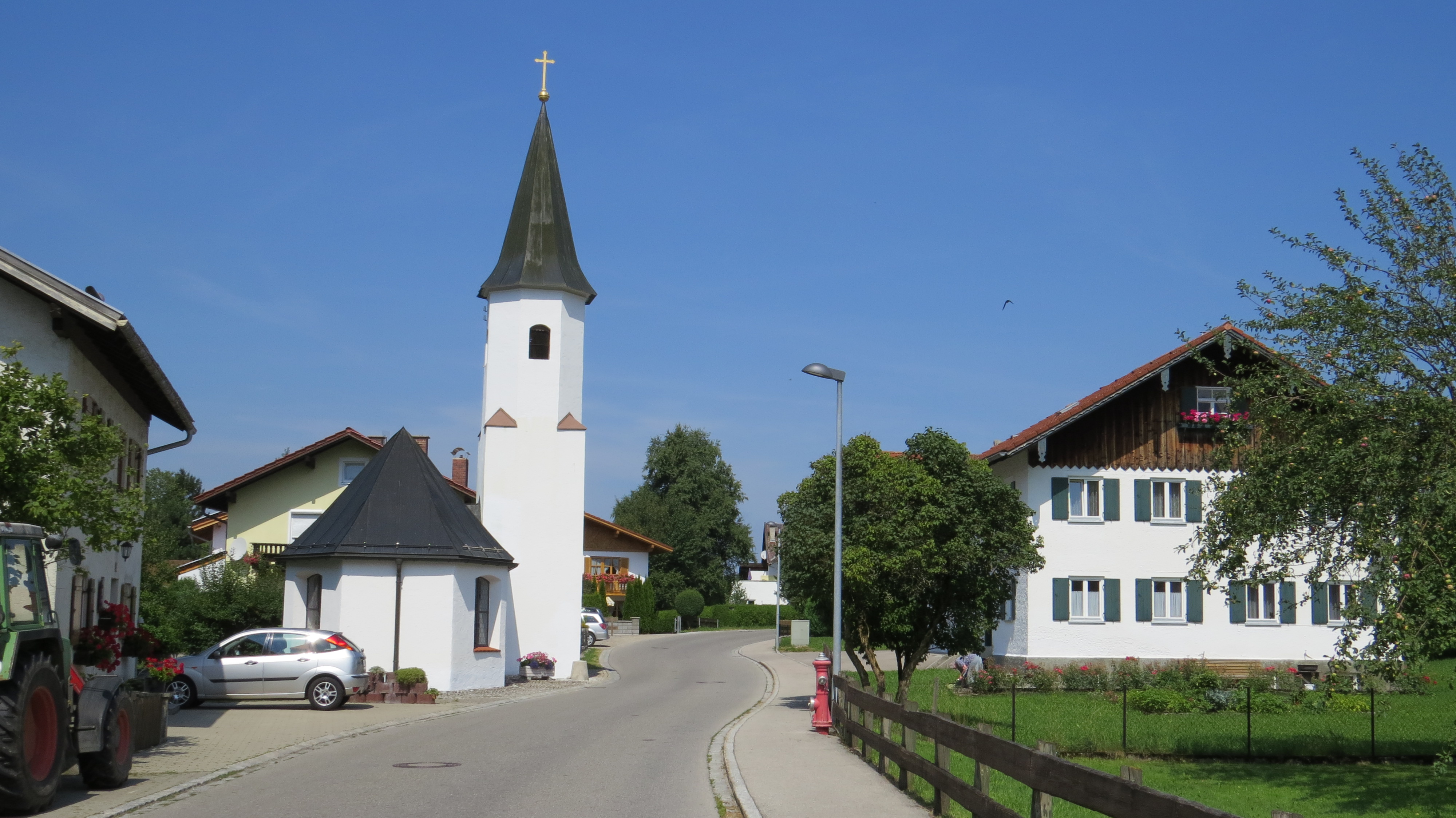 Kapelle in Buching, Halblech